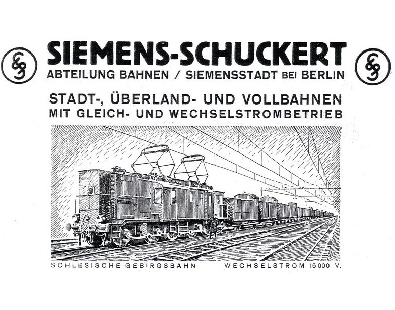 Werbeplakat von SSW mit der E 91.3